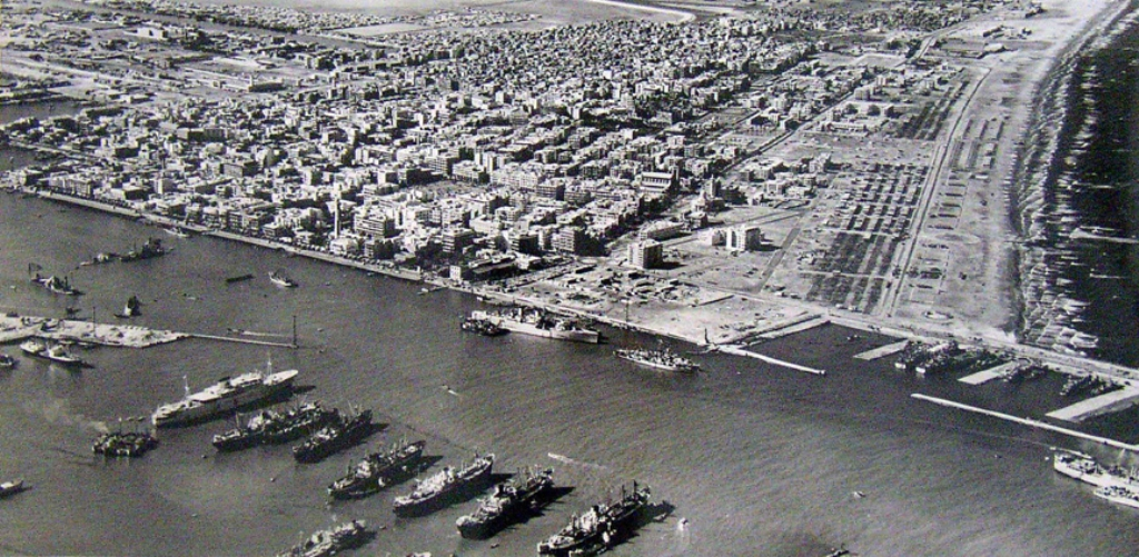 מבט מהאוויר על כלי שיט בריטיים וצרפתים בנמל פורט סעיד